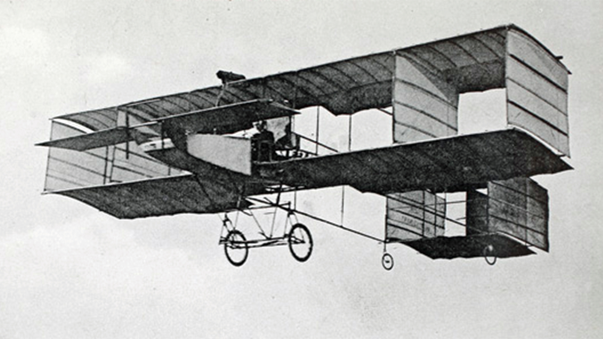 Sports - Aviation - Issy (6 septembre [1908]) - Delagrange bat les records du monde en faisant 15 fois 1/2 le tour du Champ de manoeuvreAdresse actuelle : Héliport